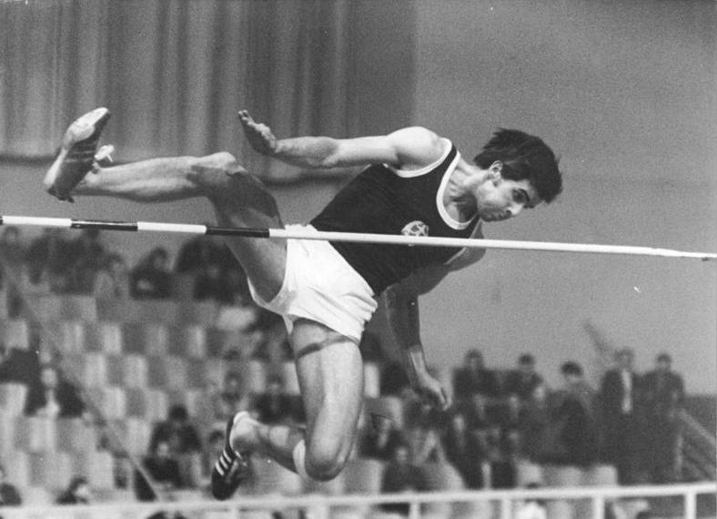 Stefan Junge ADN-ZB Demme 12.2.1972 Berlin: DDR-Leichtathletik-Hallen-Meisterschaften 1972. Bei den Wettkämpfen in der Dynamo-Sporthalle übersprang Stefan Junge vom SC DHfK Leipzig 2,17 m und sicherte sich damit den Titel im Hochsprung.